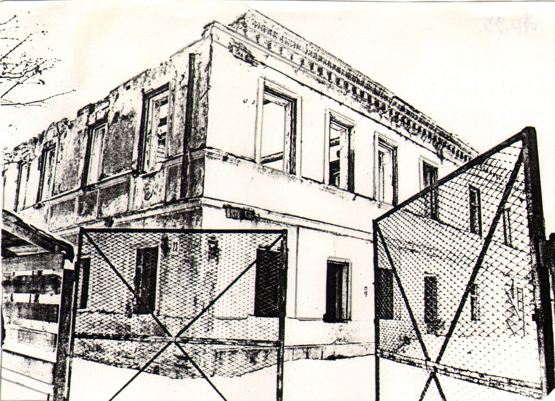 Дом Древицкого. Таганрог, ул. Фрунзе 23